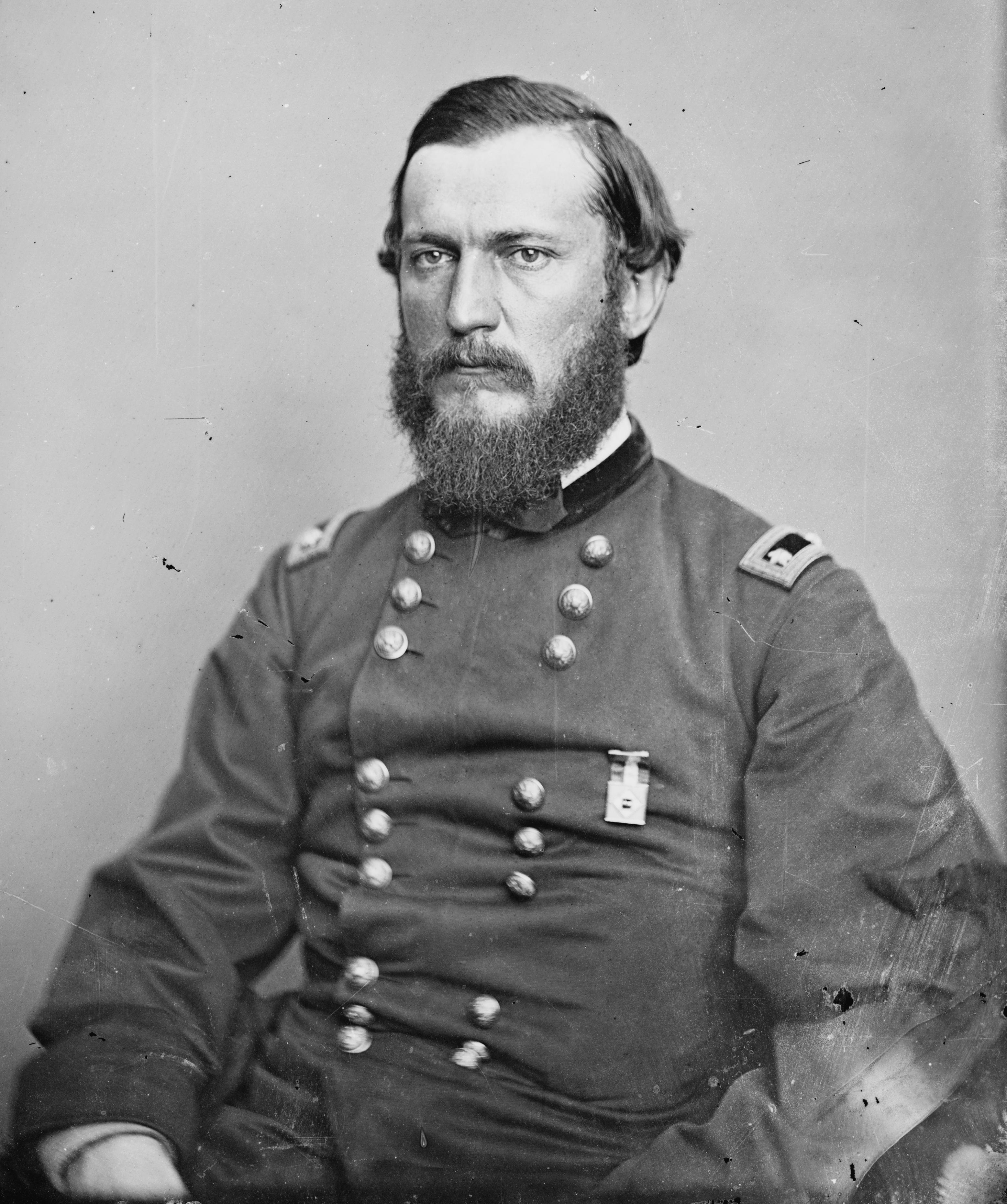 Godfrey Weitzel. Library of Congress description: "Gen. Weitzel, U.S.A."